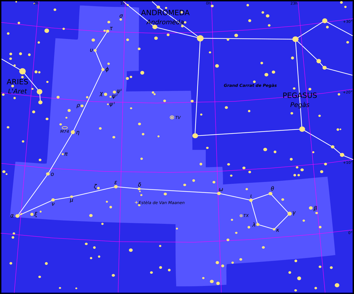 Constellacion dei Peis.